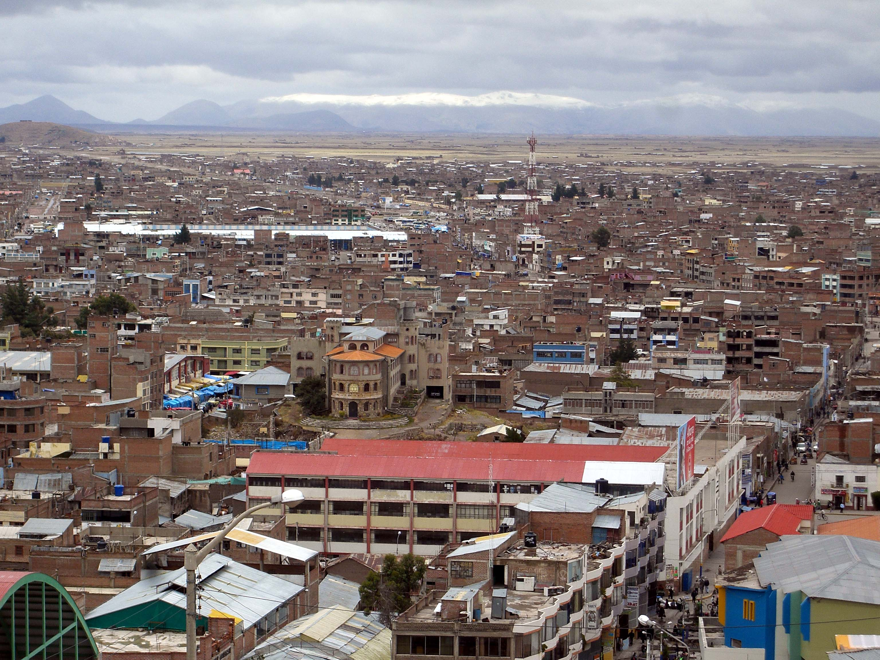 Juliaca, vista parcial de la ciudad tomada desde el mirador del cerro Santa Cruz, el dia estaba nublado pocas horas antes cayo una nevada inusual por eso estaban de blanco los cerros del frente, se aprecia en primer plano el Colegio San Roman y el Convento de los Padres Franciscanos.